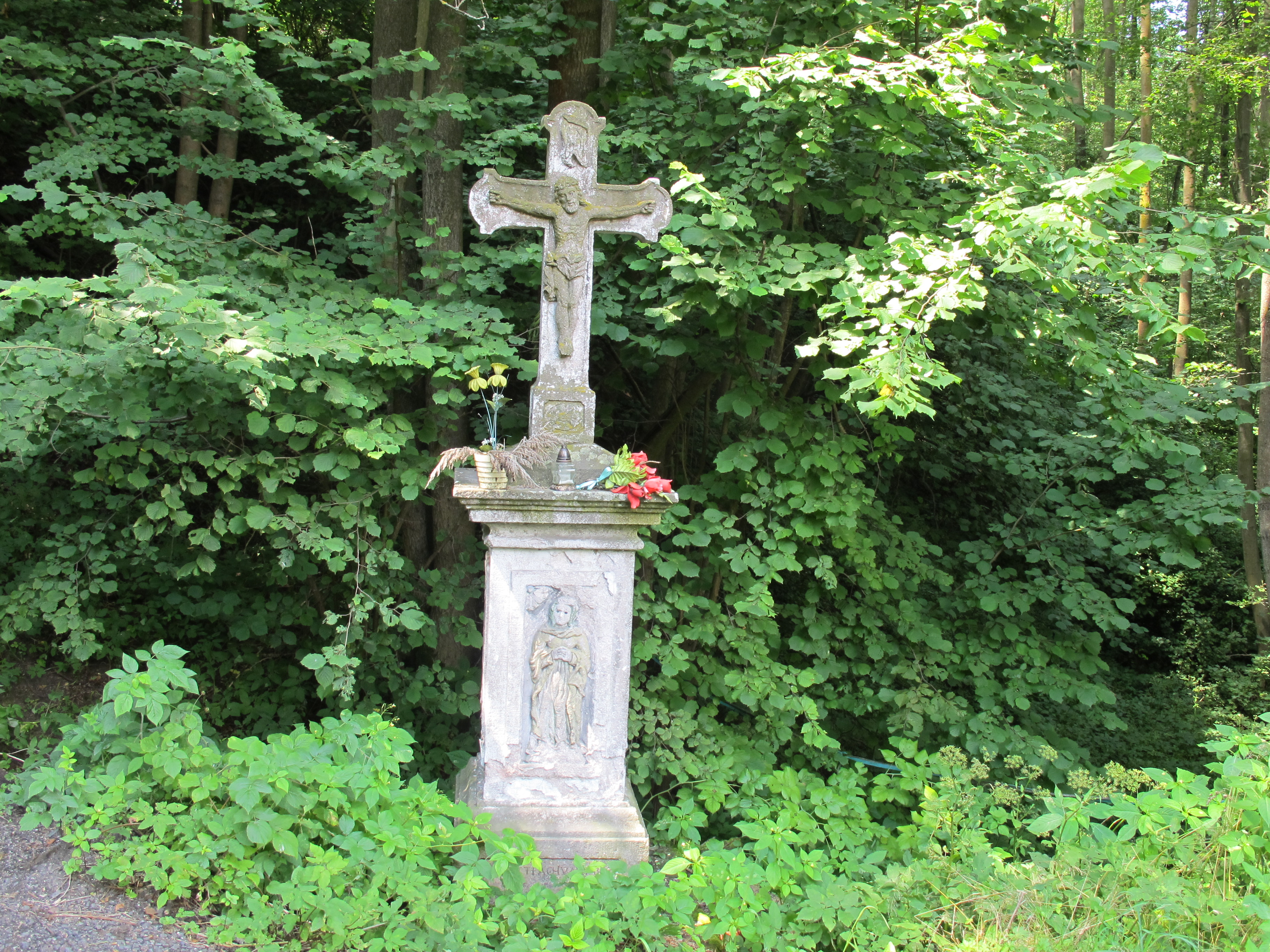 Podtýn u Žernova, okr. Semily